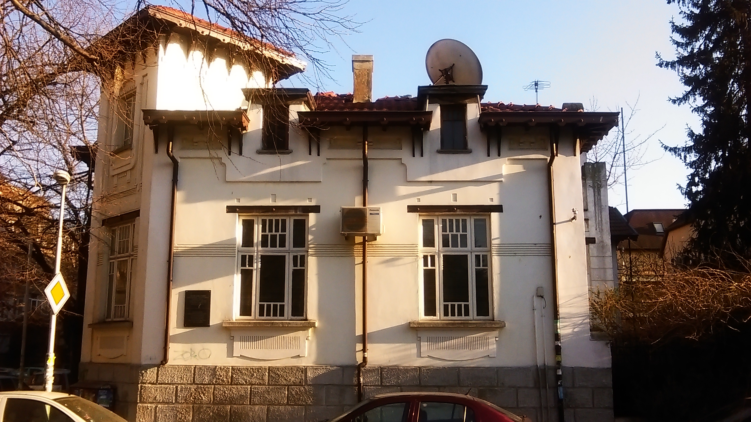 Родният дом на физика Фриц Цвики на ул. Иван Драсов и ул. Братя Миладинови във Варна